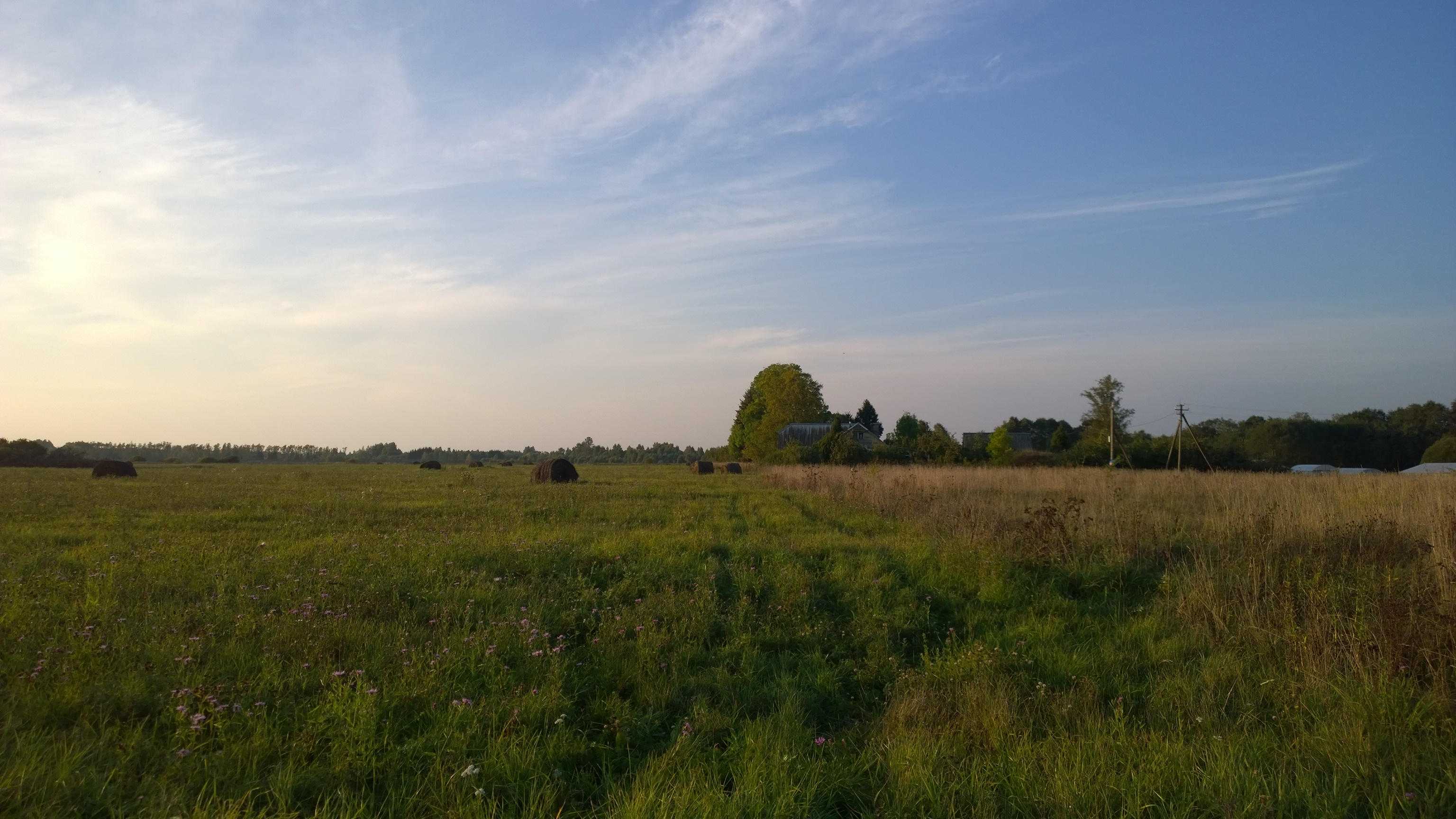 Фотография, сделанная в начале осени, с видом на деревню Шмыки